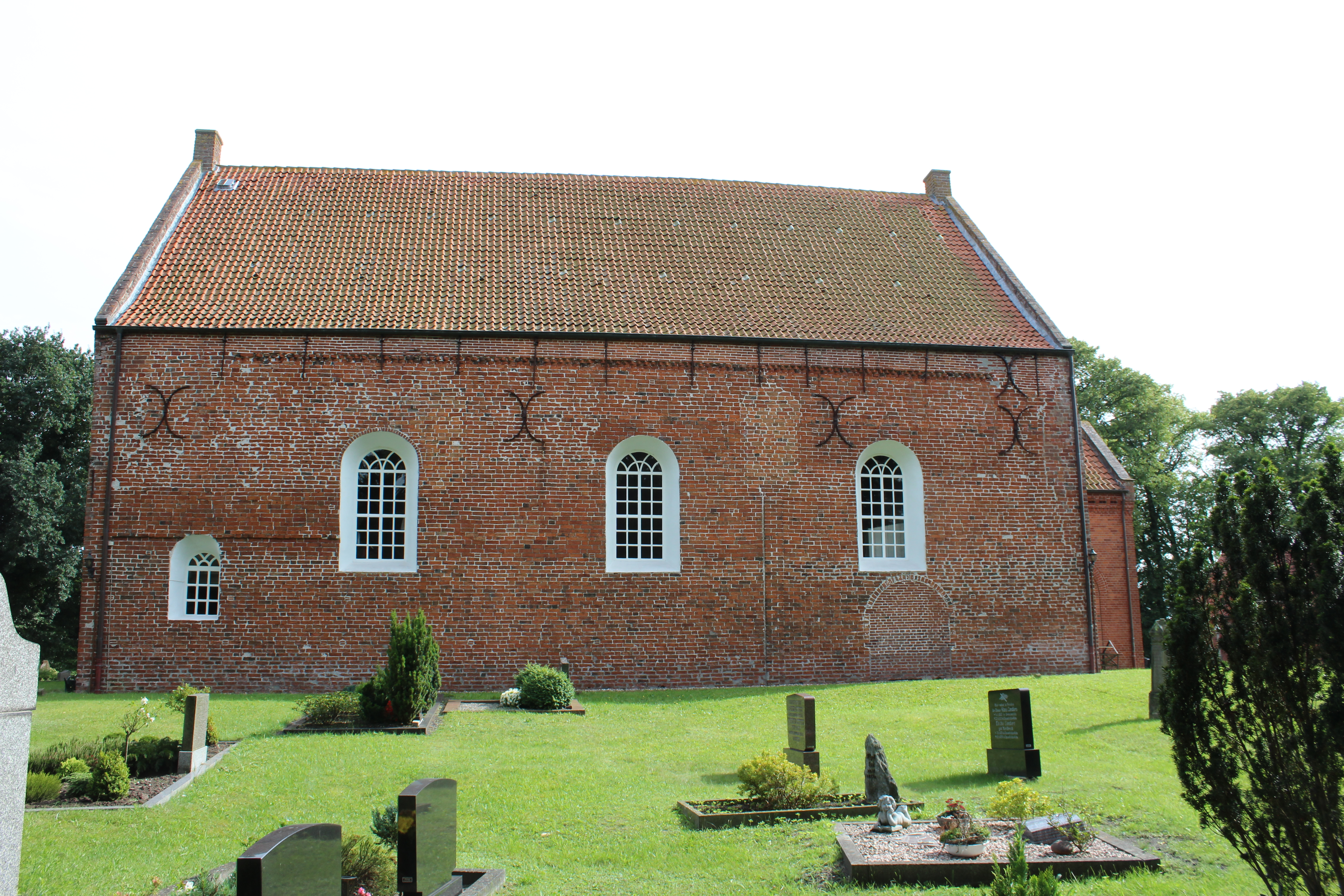 Evangelisch-reformierte Kirche Ihrhove, Gemeinde Westoverledingen, Landkreis Leer, Ostfriesland, Niedersachsen, Deutschland